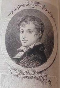 Portrait du poète français Charles-Hubert Millevoye.